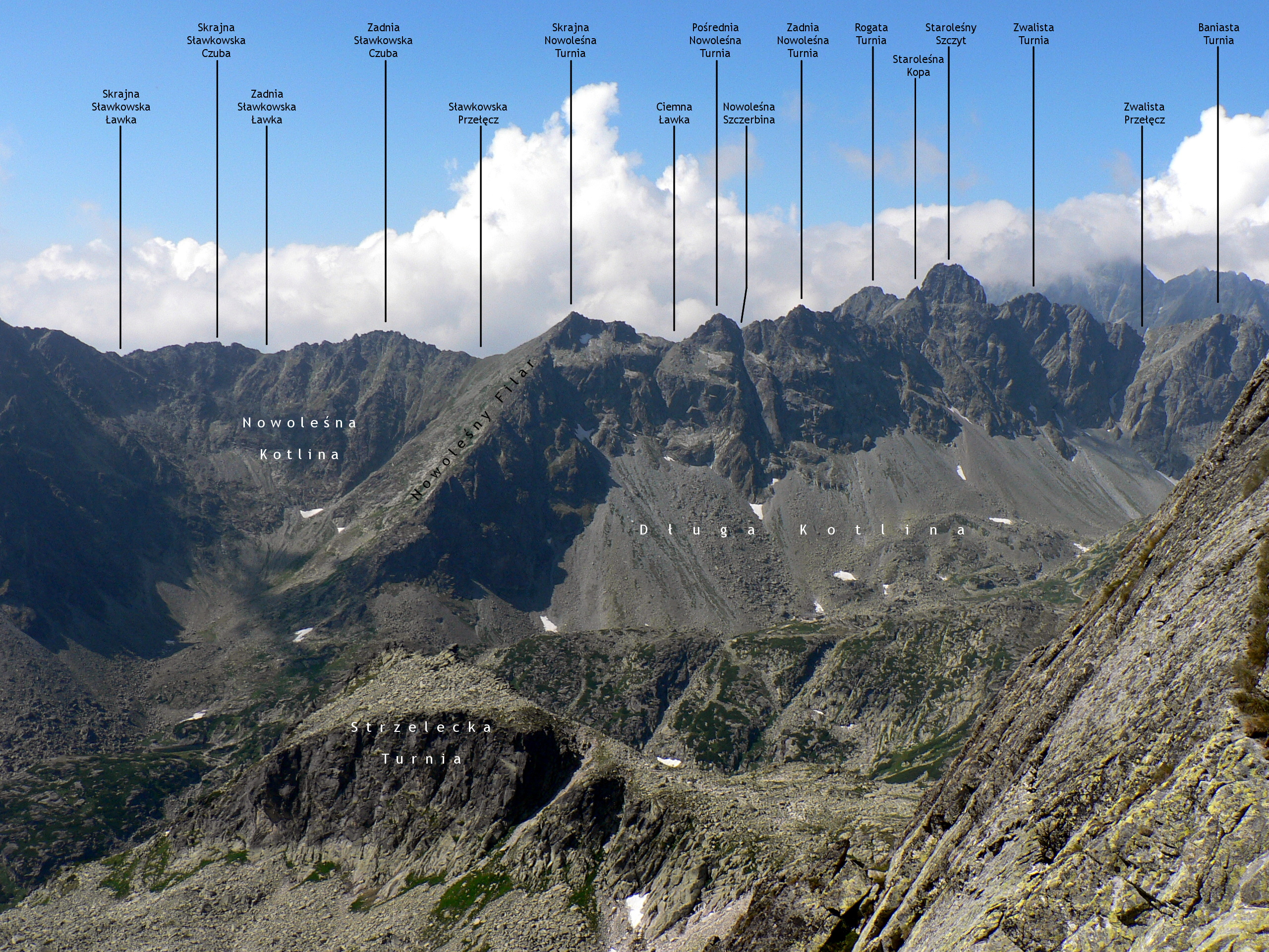 Sławkowska Grań, Nowoleśna Grań i Staroleśny Szczyt. Widok ze szlaku z Czerwonej Ławki